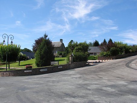 Chameyrat (Corrèze, France)